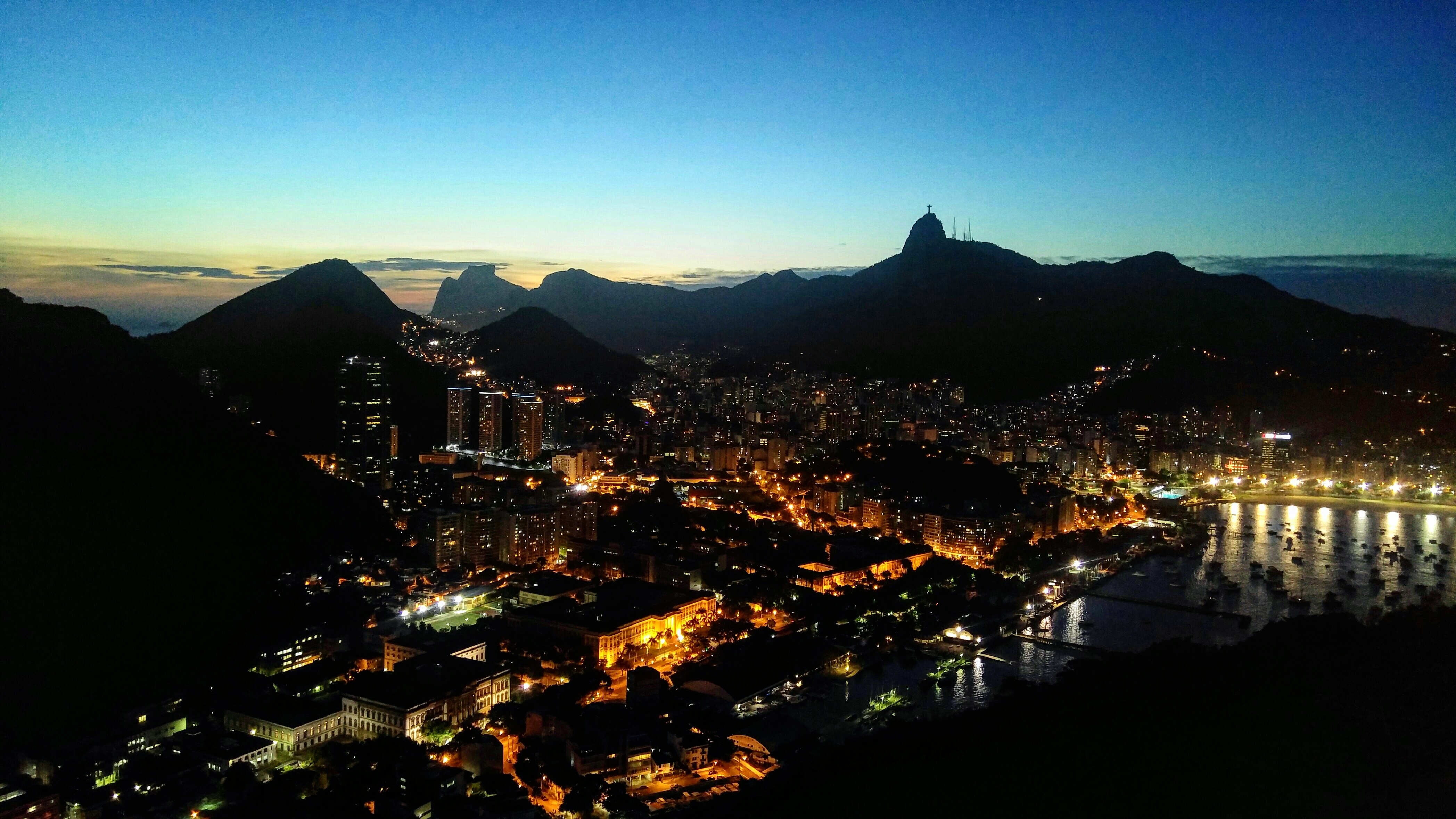 Atardecer de Rio de Janeiro visto desde el Pão de Açúcar